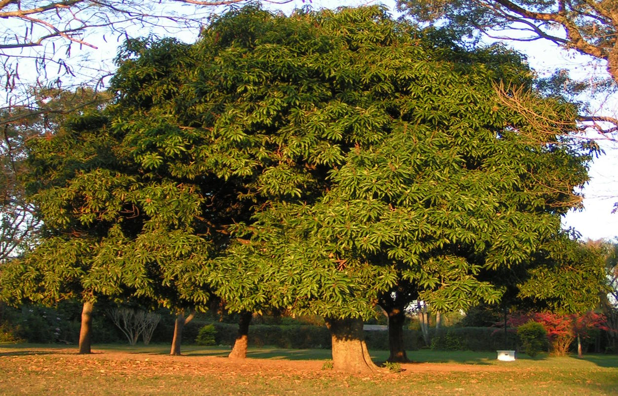 Mango (Manguifera indica)